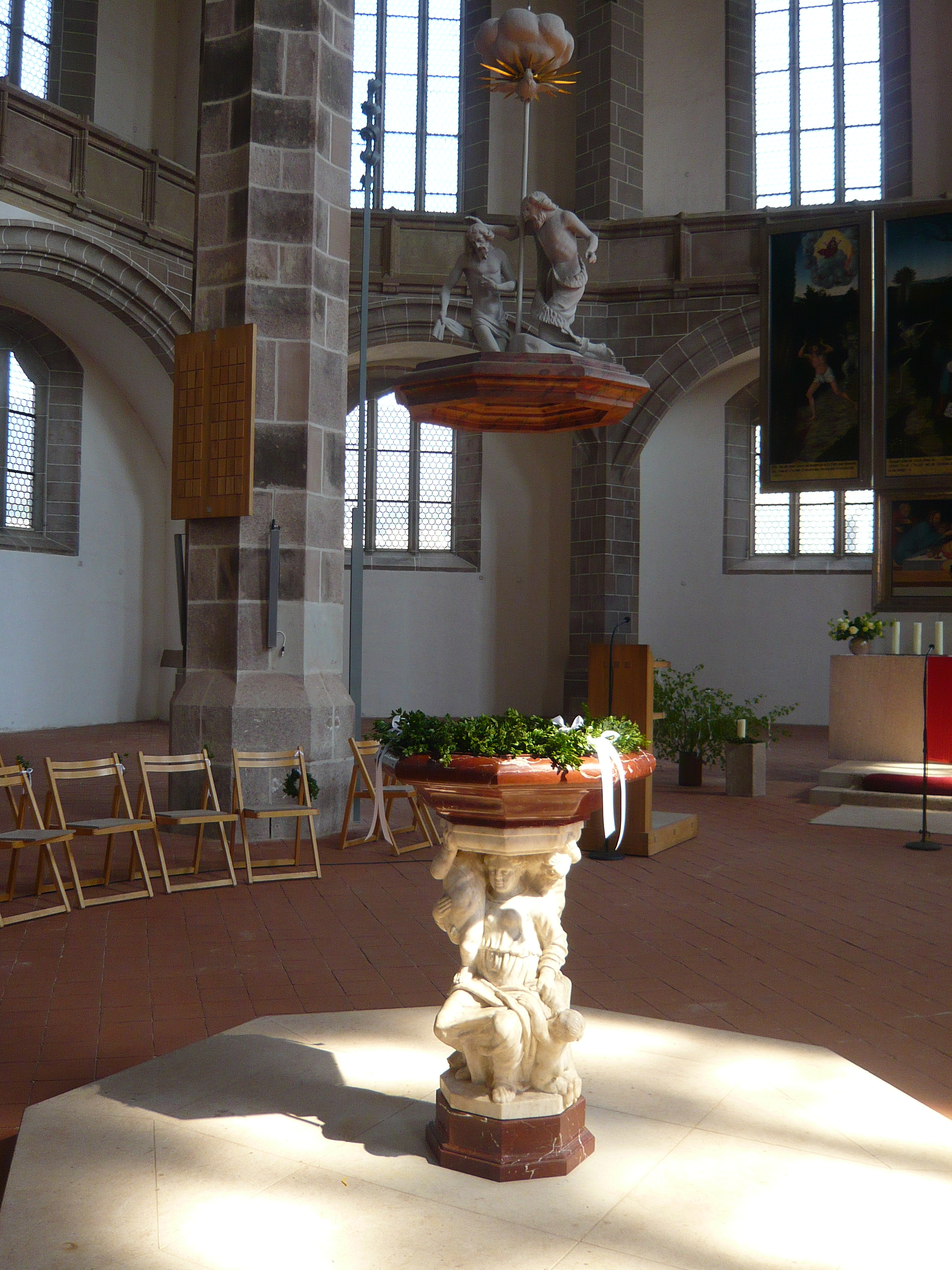 St. Wolfgangs-Kirche, Schneeberg: Taufstein mit aufgezogenem Deckel